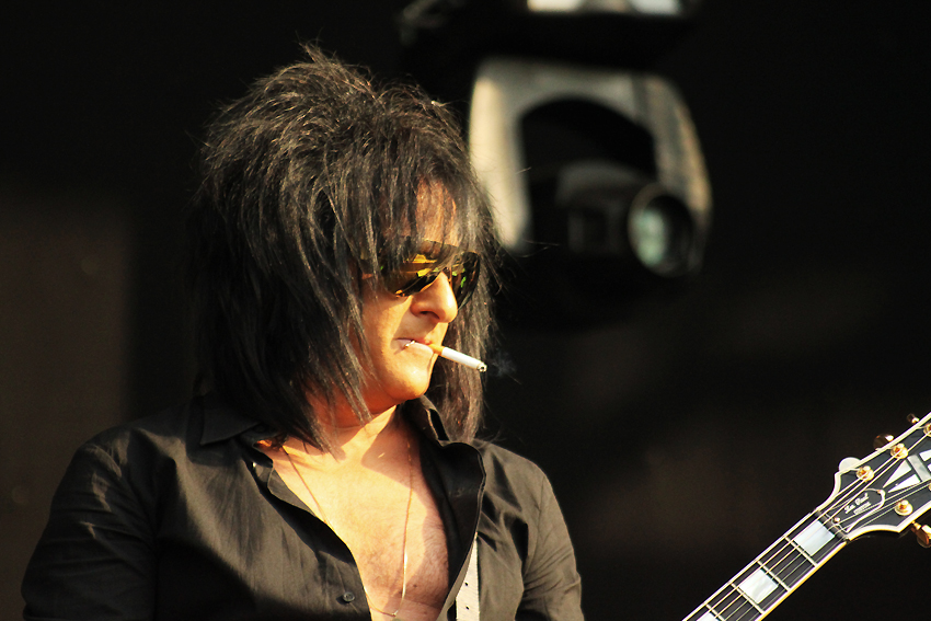 Steve Stevens performing with Billy Idol at Bospop festival, Weert, the Netherlands, 2010-07-11